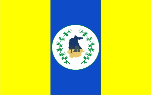 Bandeira do Município cearense de Itapipoca